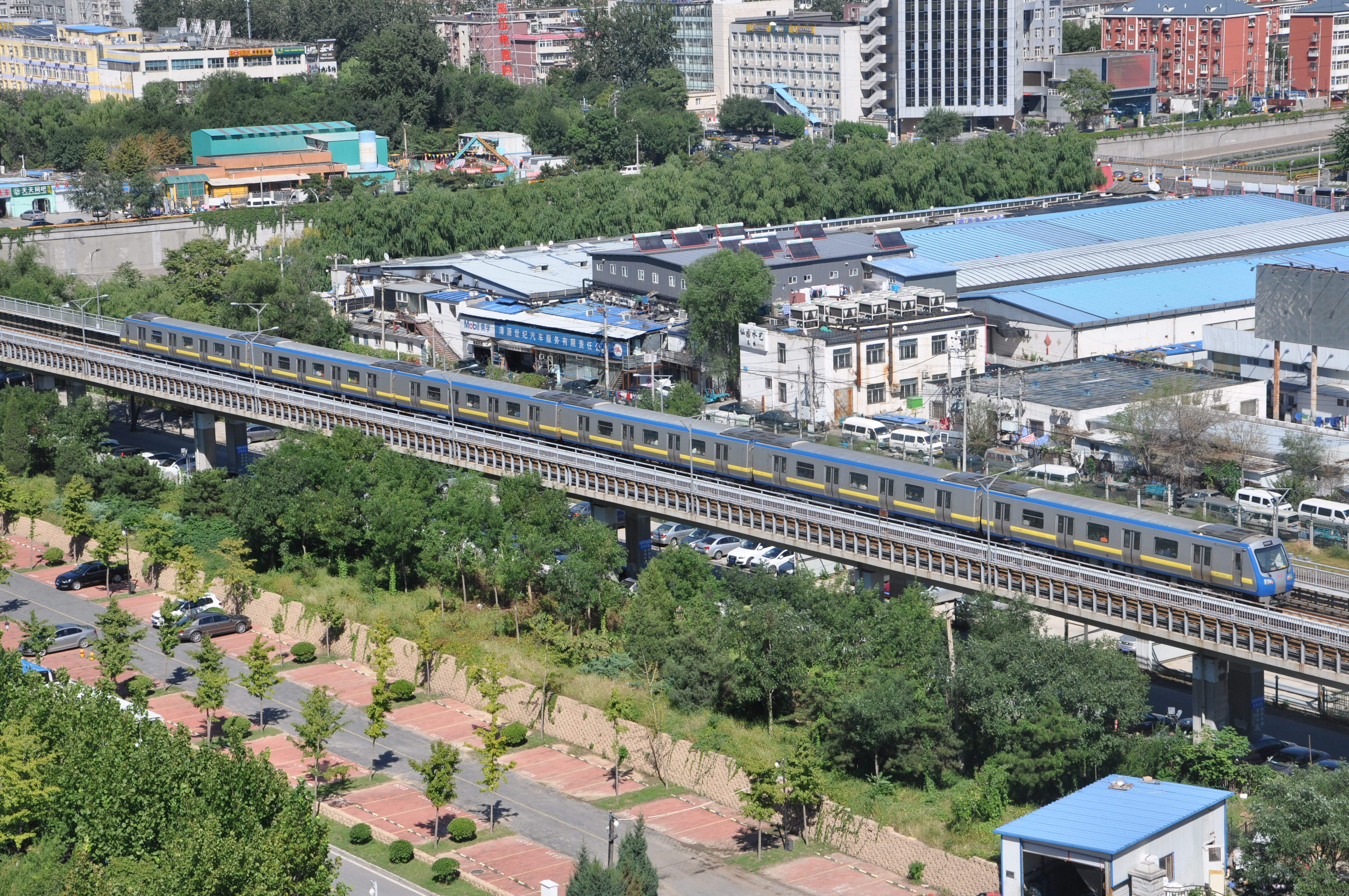 北京地铁13号线DKZ5电动客车（大修后）通过13号线知春路-五道口区间，摄于青年公寓